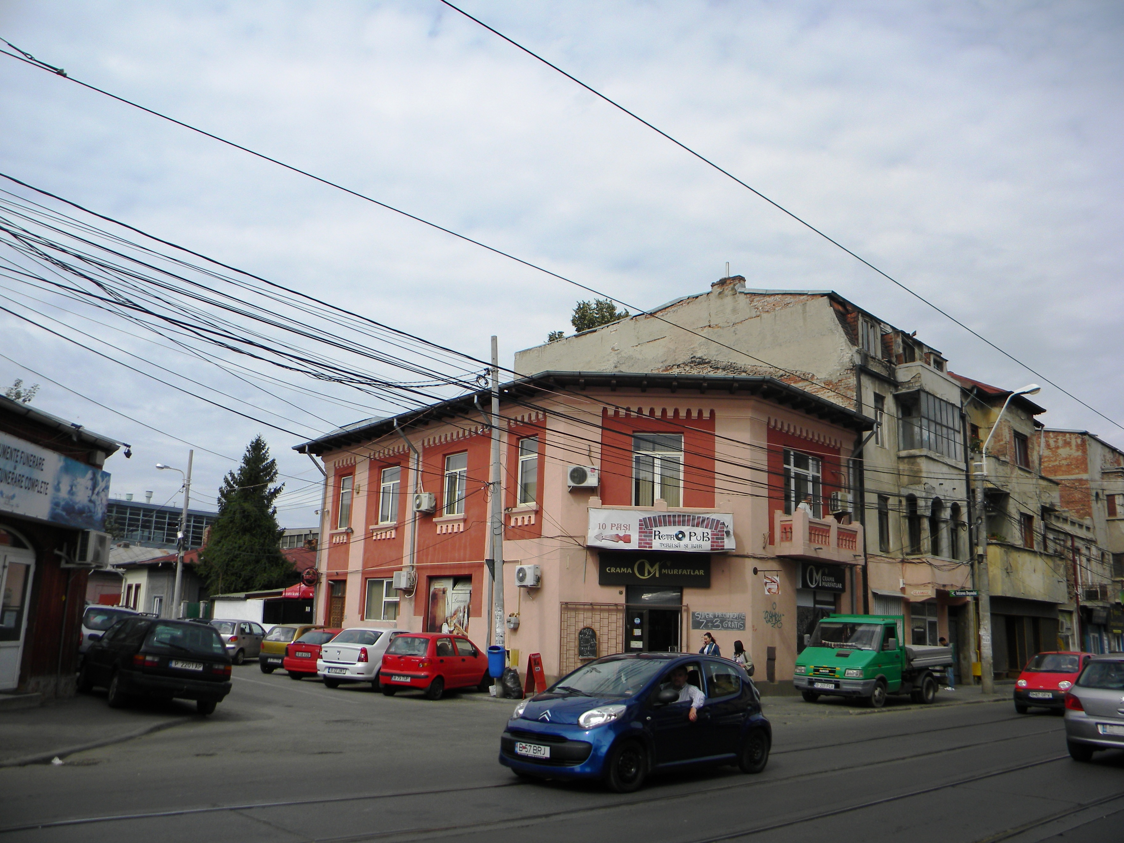 Bucuresti, Romania, Casa pe Str. Lizeanu nr. 17, sect. 2